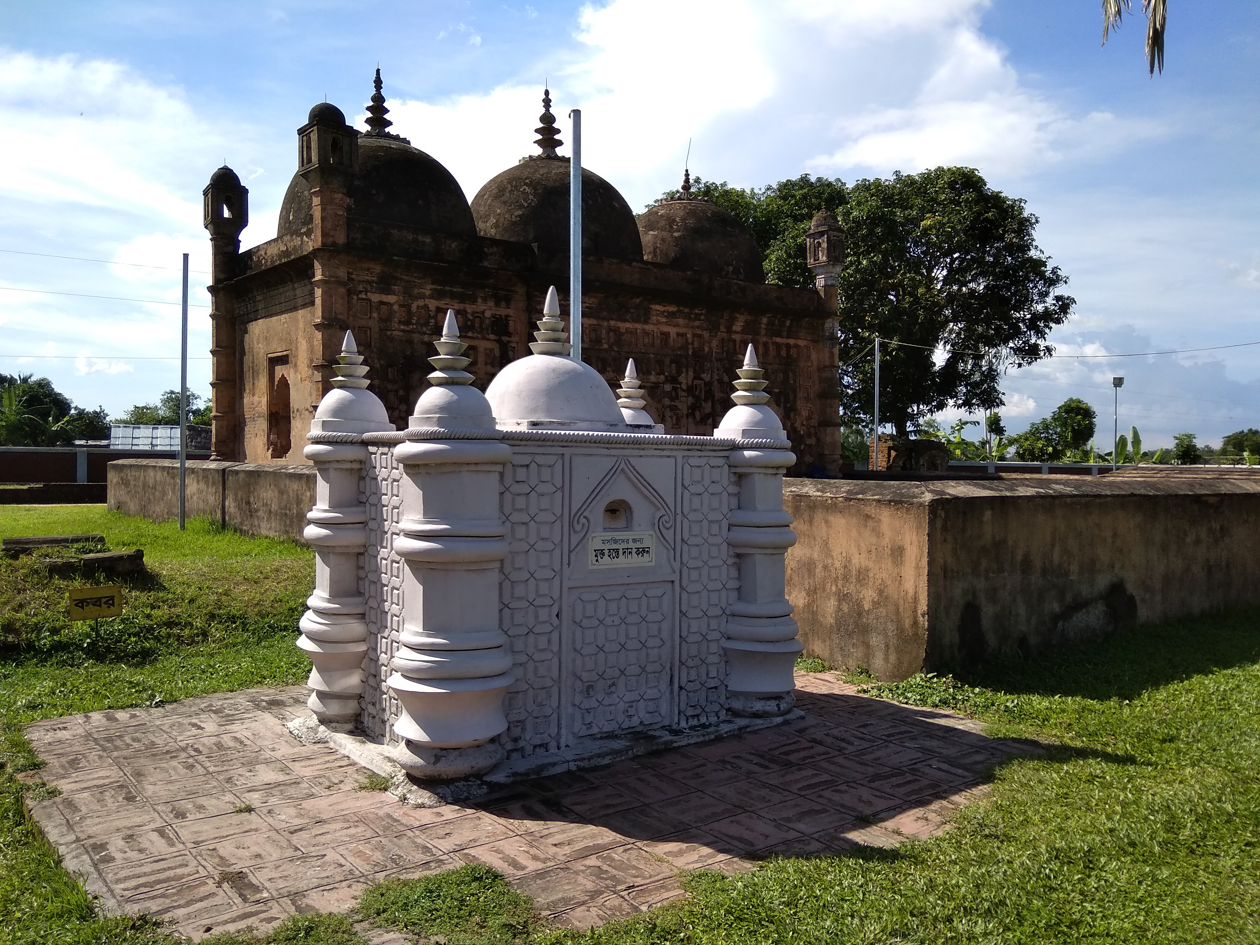 প্রাচীন মসজিদ (নয়াবাদ)